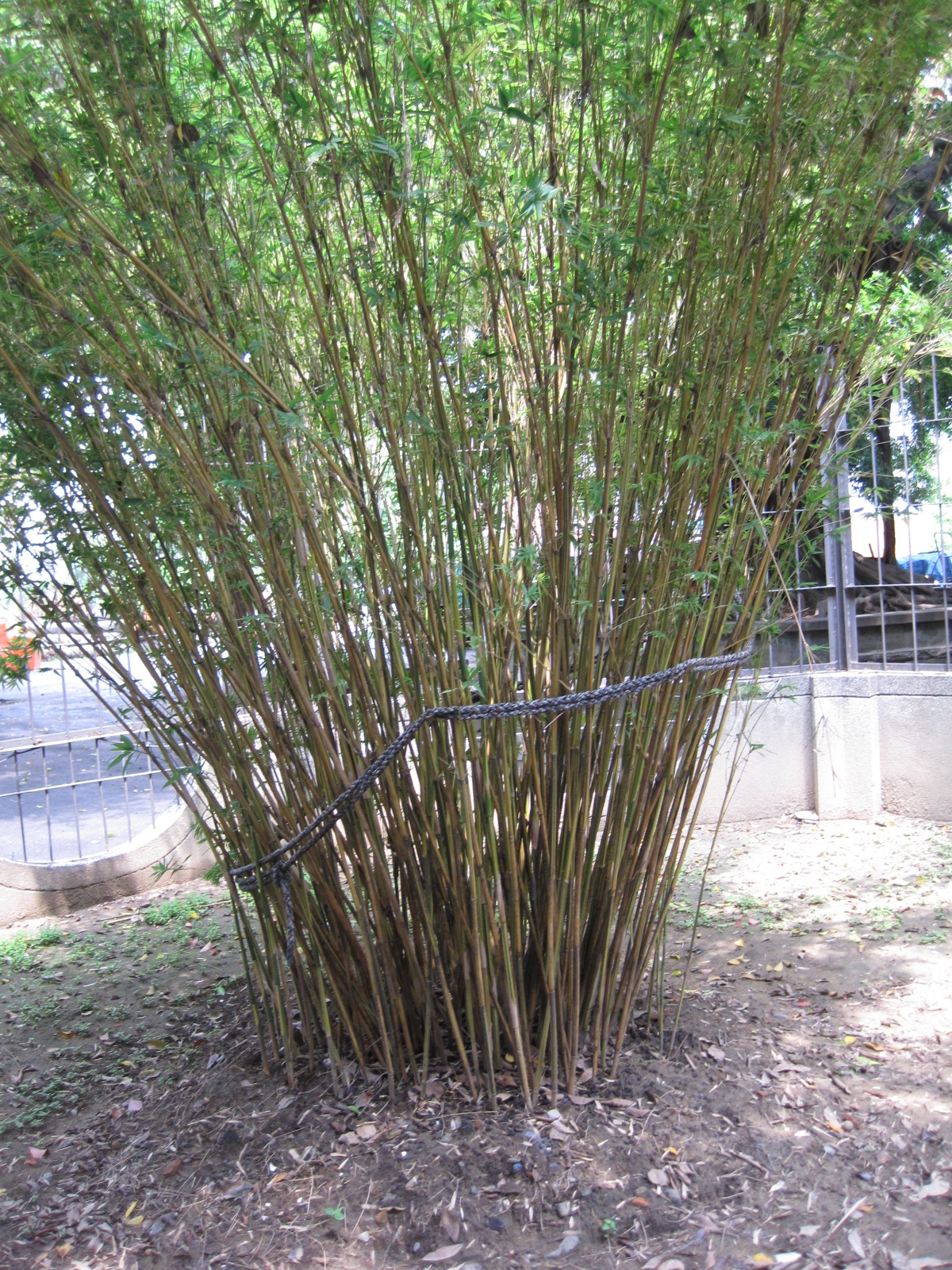 臺南開元寺七弦竹